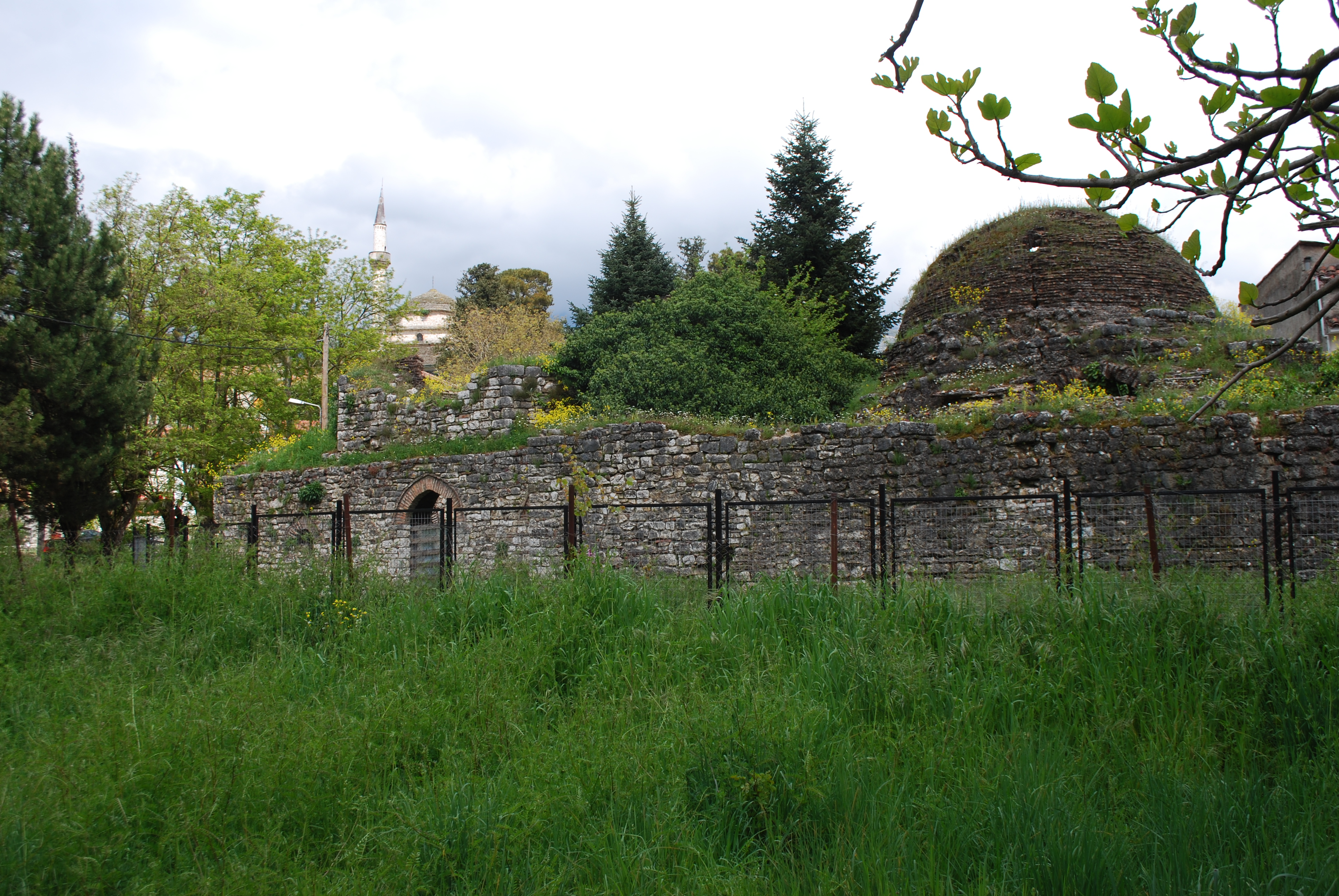 Vue de Ioannina.